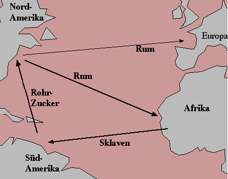 Dreieckshandel.rum